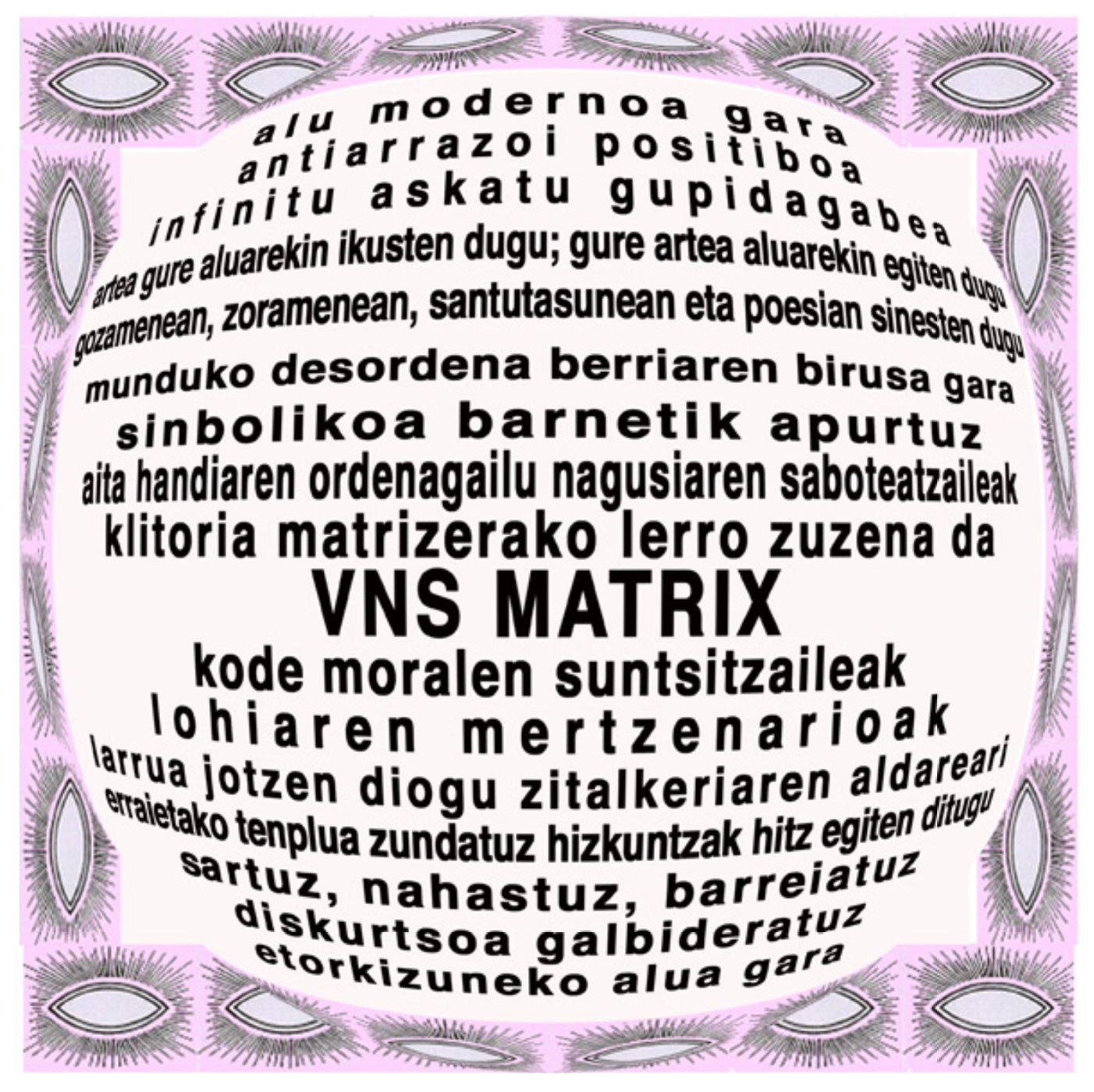 VNS Matrix kolektiboak 1991n argitaratu zuen manifestu ziberfeminista.